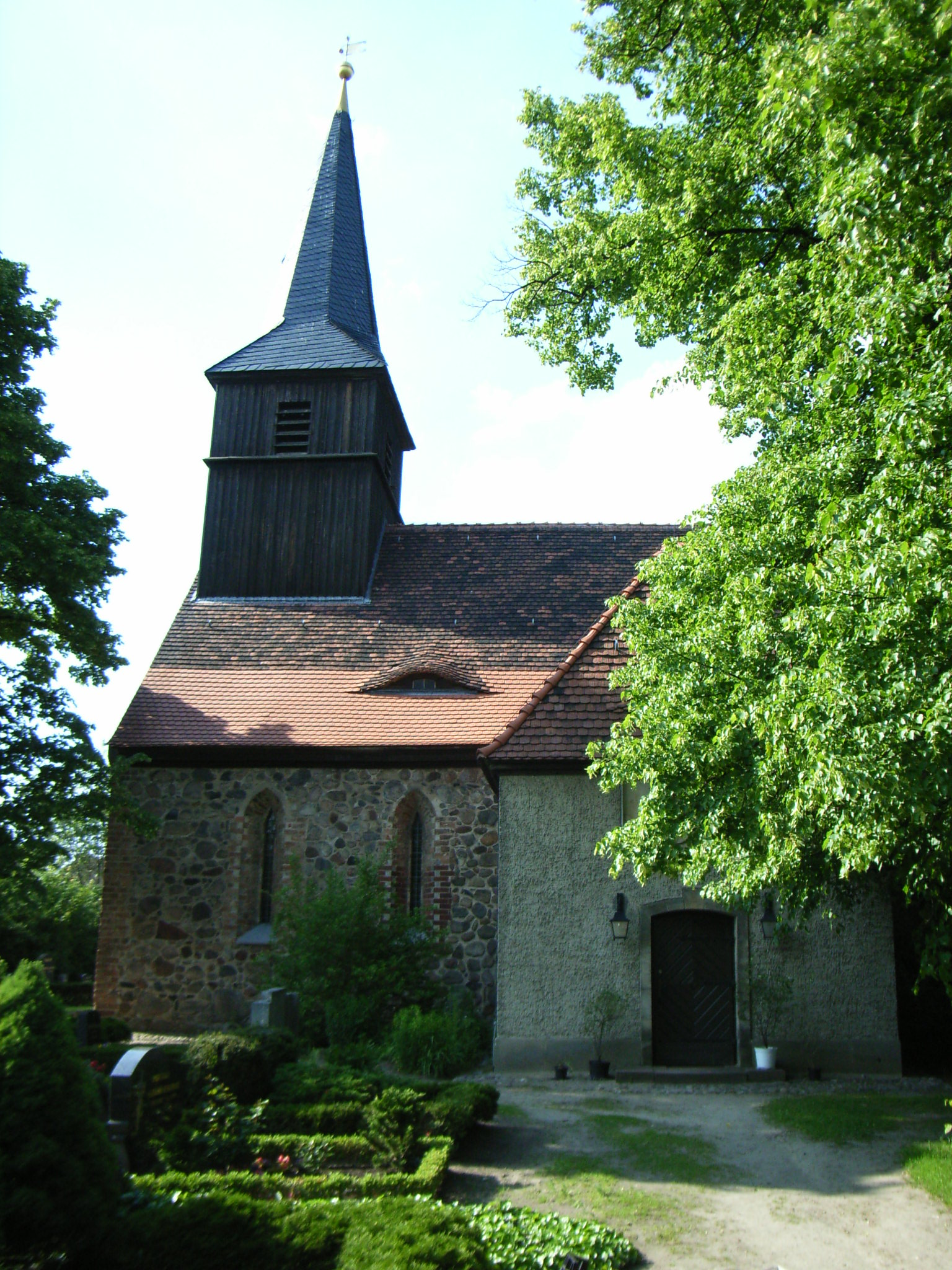 Berlin-Blankenfelde, Dorfkirche